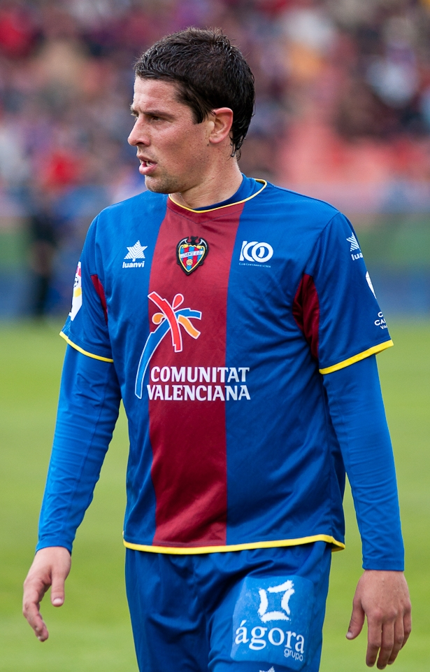 El jugador granota Asier Del Horno